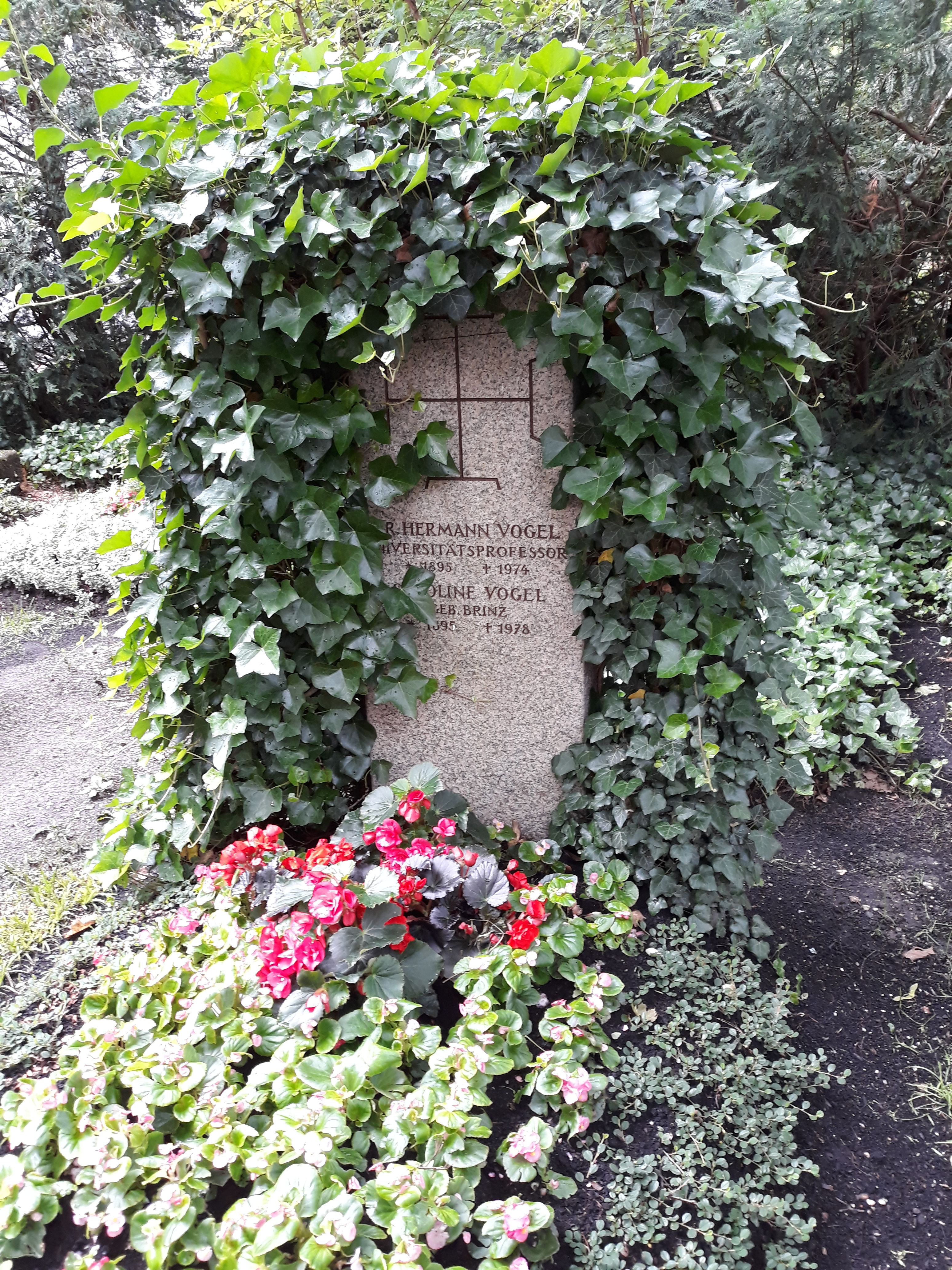 Familiengrab des deutschen Agrarwissenschaftlers Hermann Vogel und seiner Ehefrau Caroline, München, Bogenhausener Friedhof